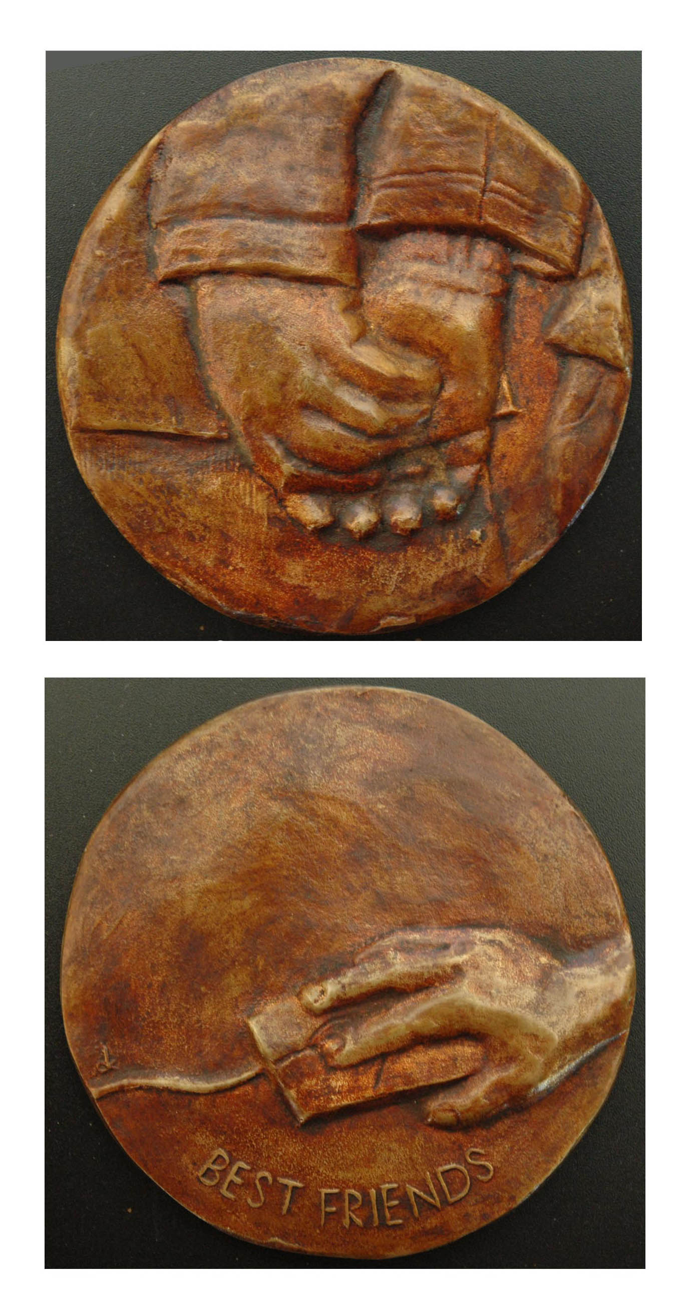 Best friends - medal